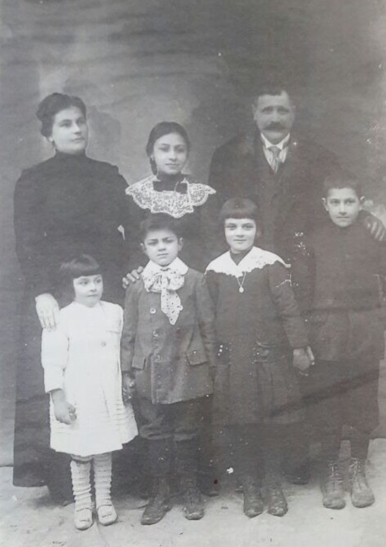 משפחת טמביני הייתה משפחה מהעיירה בניאקבלו, ממחוז רוונה באיטליה, שהסתירה והצילה יהודים בזמן מלחמת העולם השנייה. המשפחה כללה את האם אמליה (1876 - 2002), האב אורליו (ה-12 בדצמבר 1872 - ה-18 בנובמבר 1949), הבת רוזיטה והבן וינצ'נזו, שהיו בזמן השואה בשנות ה-20 לחייהם. כל בני משפחת טמביני הוכרו כחסידי אומות עולם בשנת 1974 על הצלת תשעה מבני משפחת וייס, גלנדאור ויעקובוביץ. בתמונה ניתן לראות את בני משפחת טמביני בצעירותם.